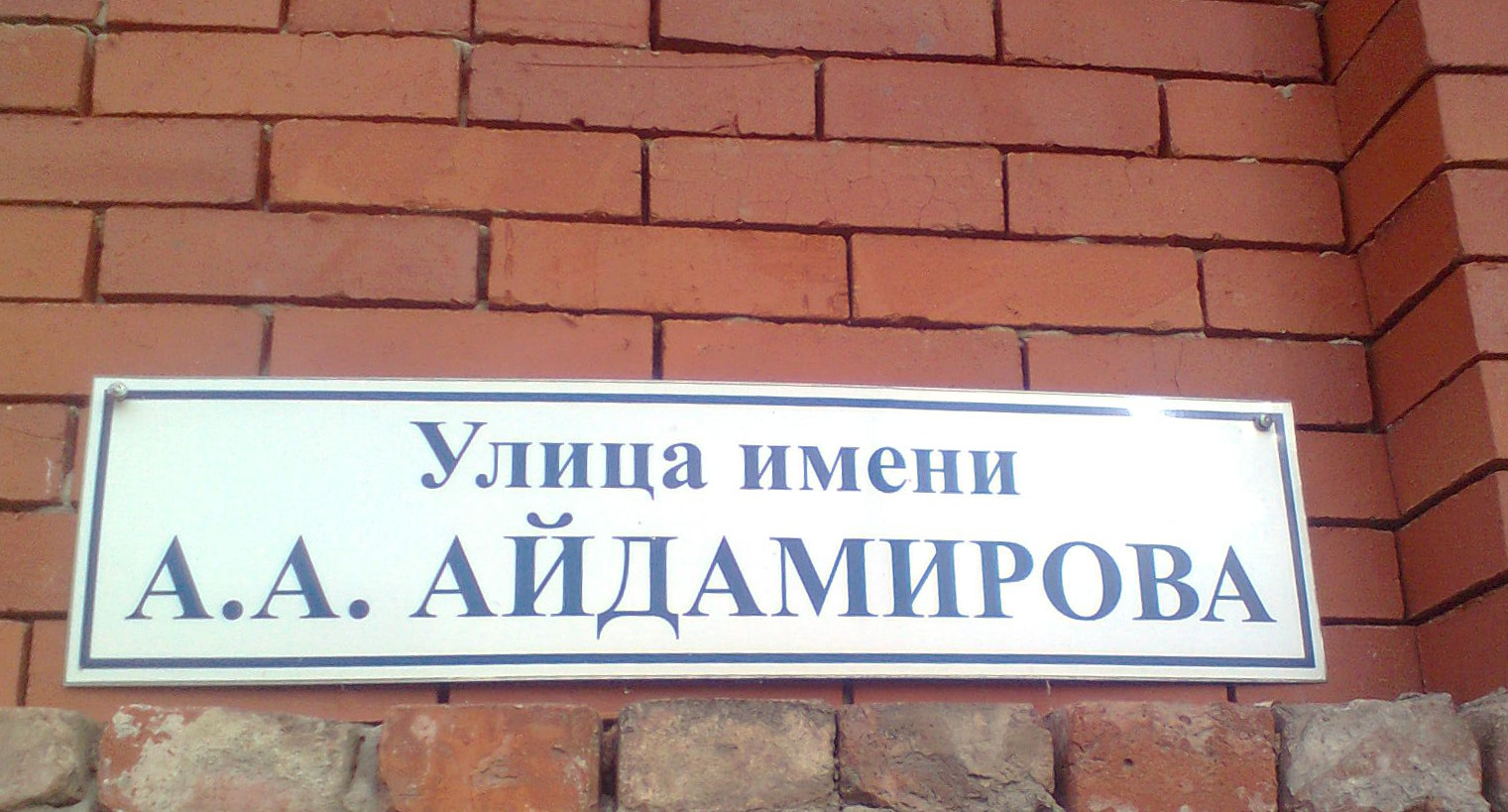 Улица имени Абузара Айдамирова в Грозном